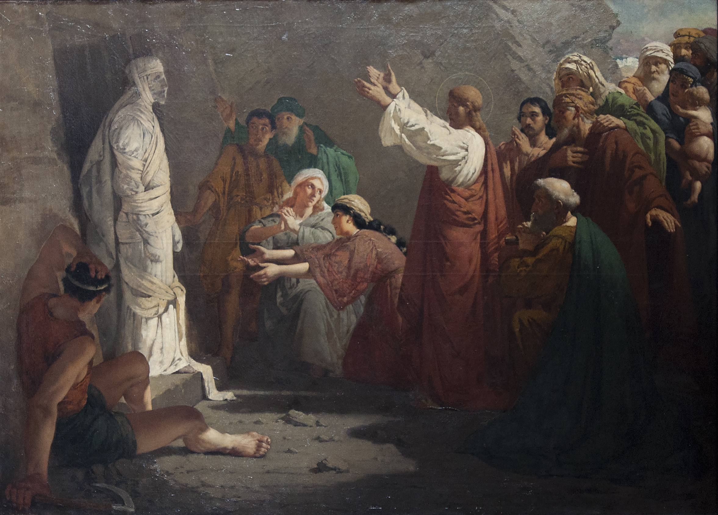 De opstanding van Lazarus van Jan-Willem Rosier (1858-1931) in de Sint-Pieterskerk te Lo, België